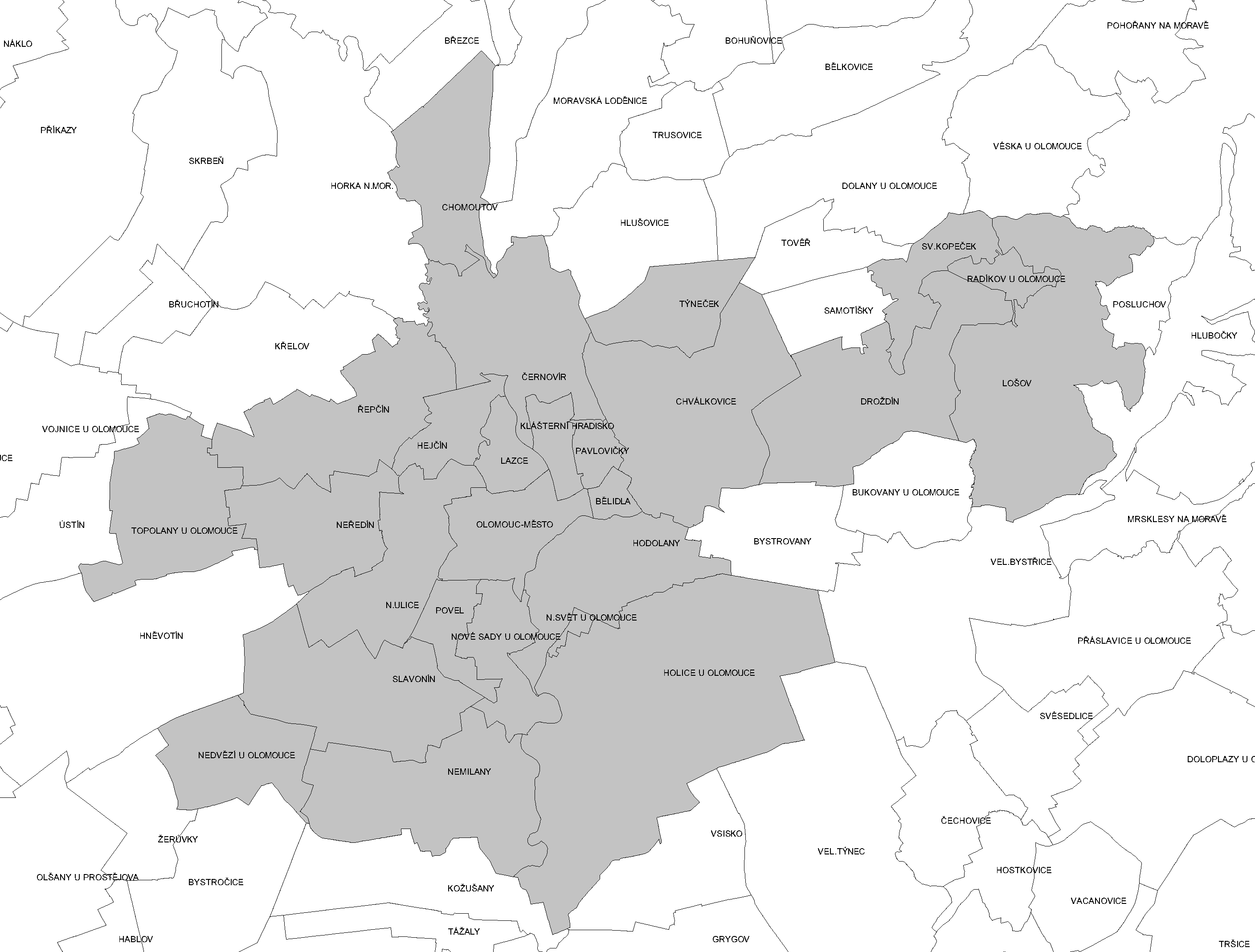 Katastrální území Olomouce